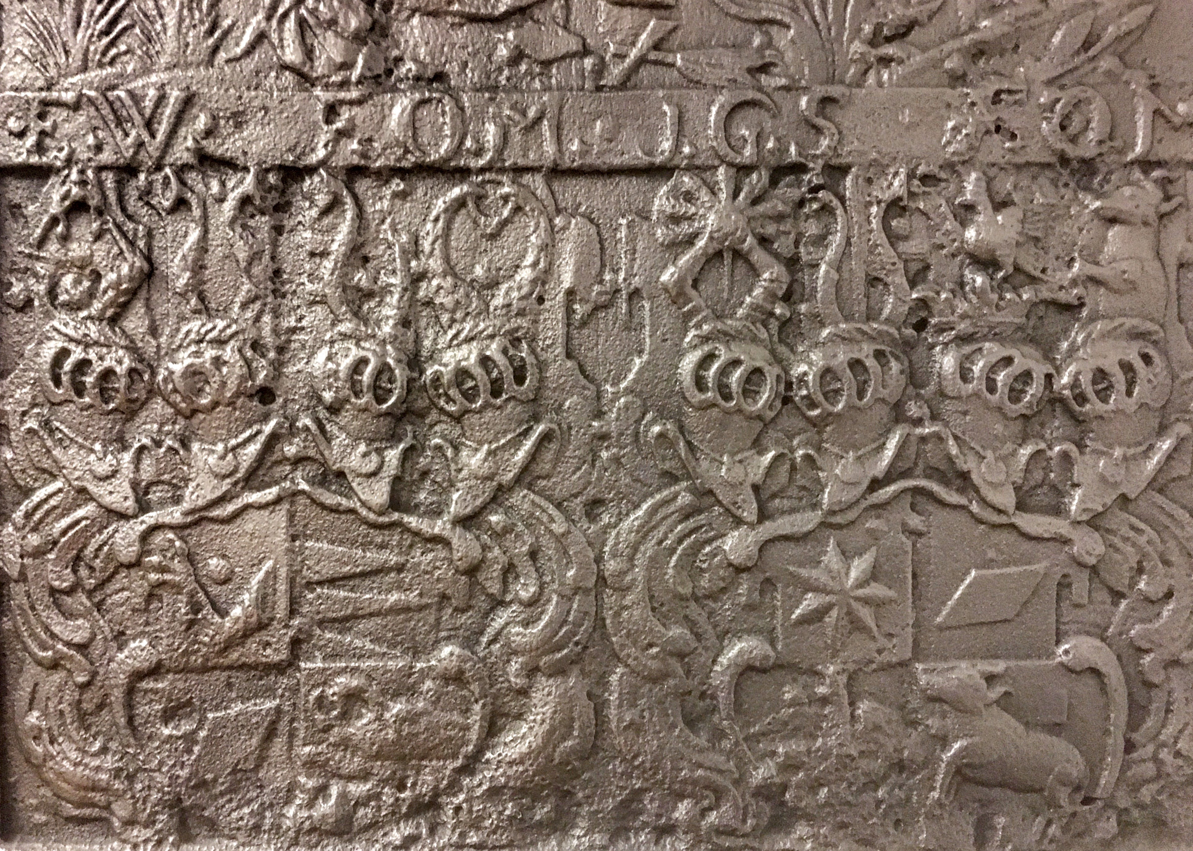 Ejler Urne og Jytte Gyldenstiernes våben, detalje fra sideplade på jernovn fra Fossum Jernværk, 1600-tallet, Nationalmuseet